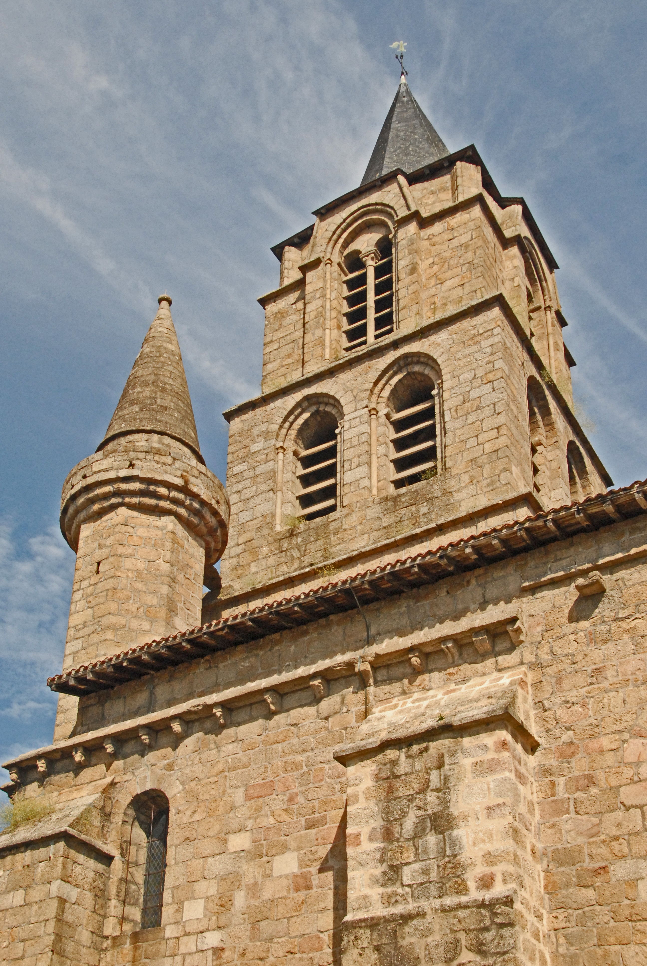 St-Junien, Westwerk von SO